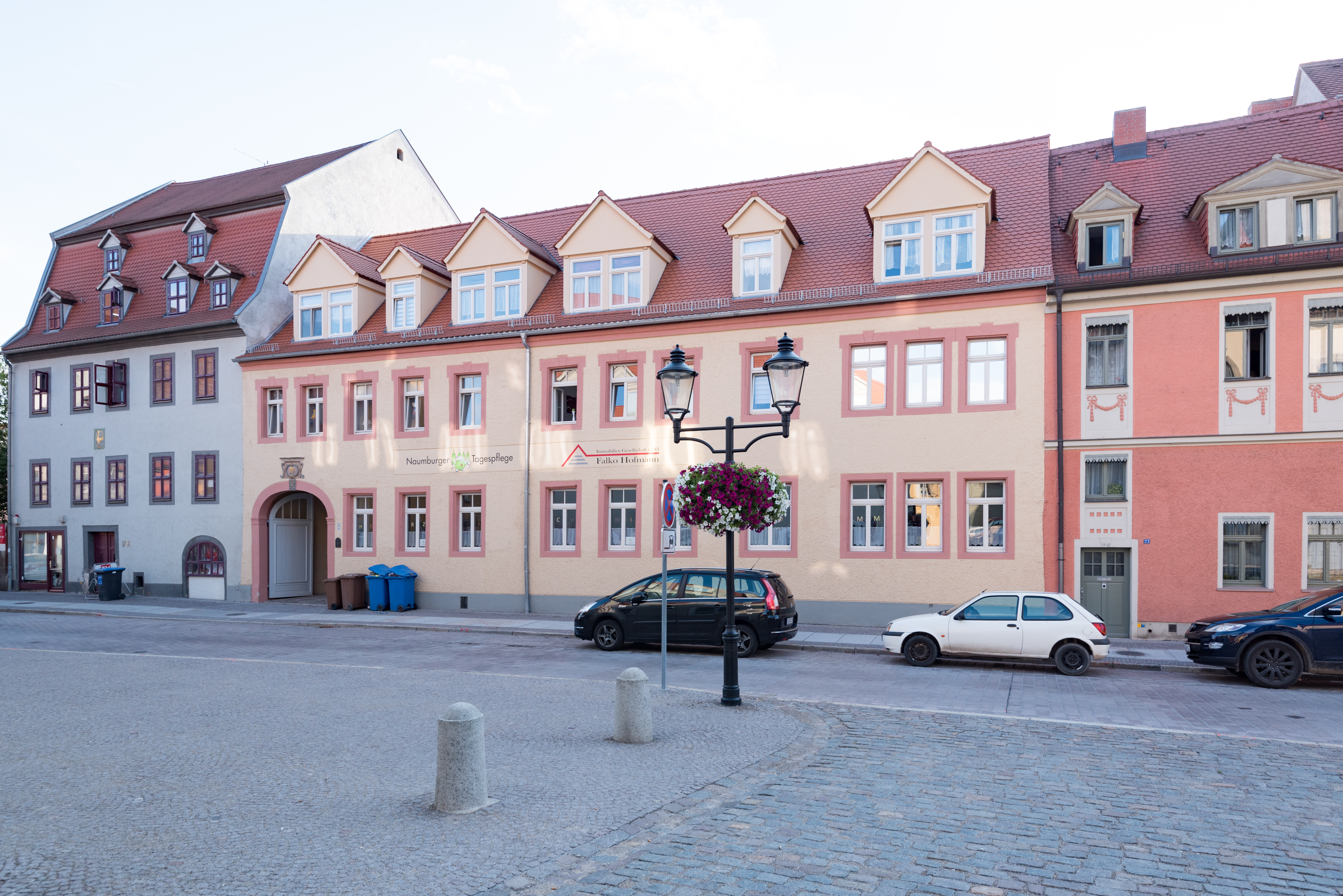 Naumburg (Saale), Marienstraße 24, 23, 22